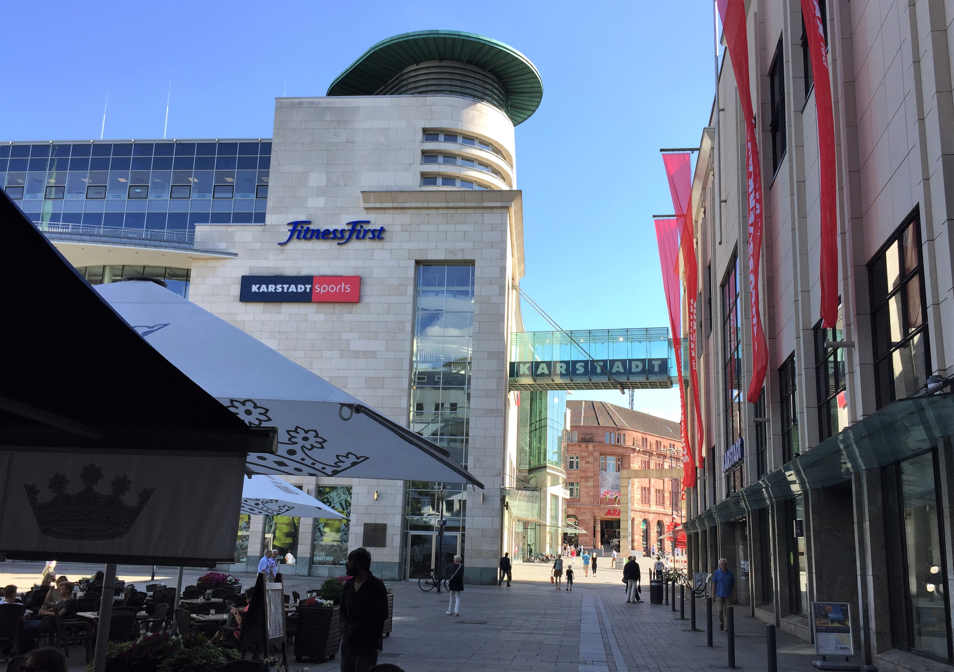 Karstadt Sports Filiale in Dortmund am Alten Markt